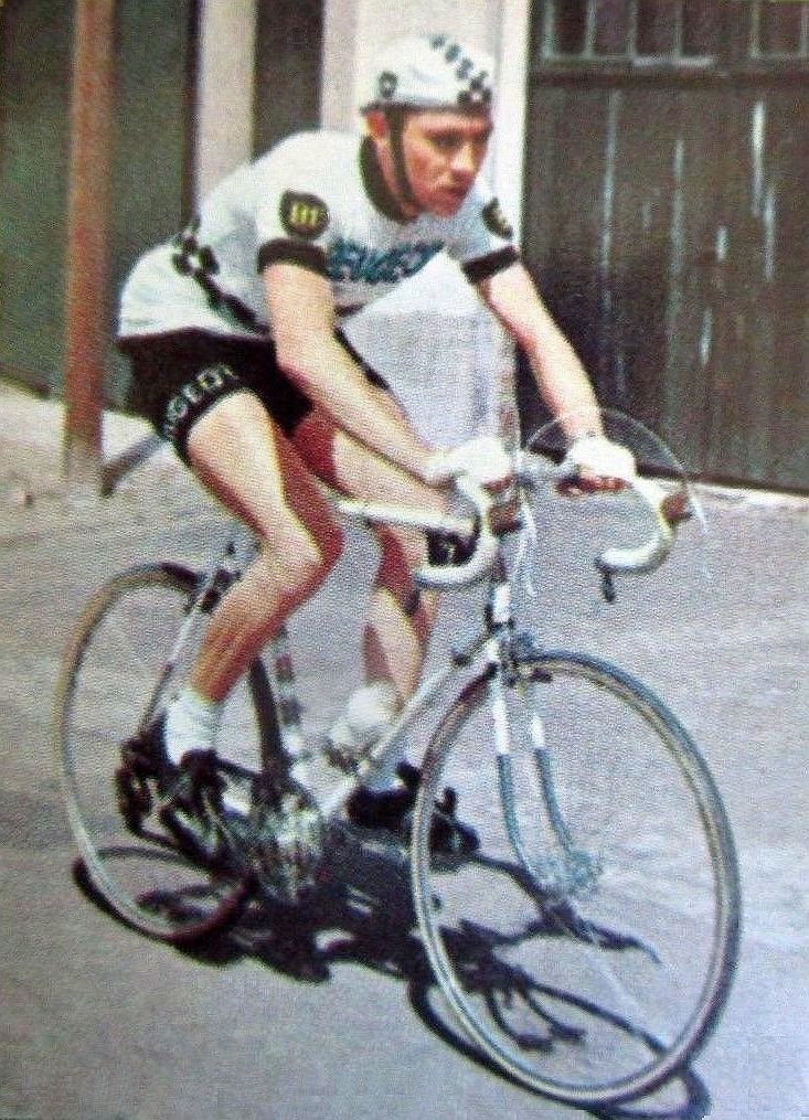 Eddy Merckx en 1966 (chez Peugeot BP Michelin) - Panini n°260.